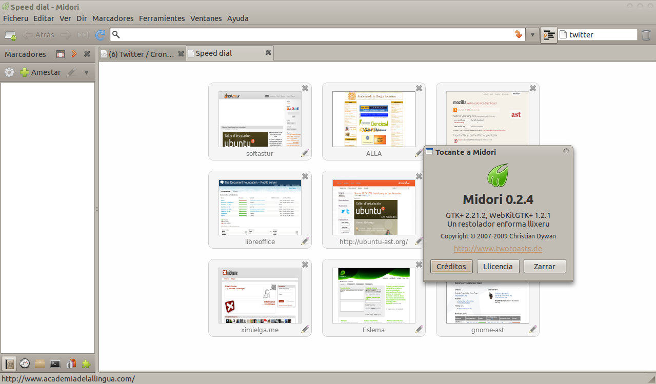 Restolador web llibre Midori n'Ubuntu 10.10